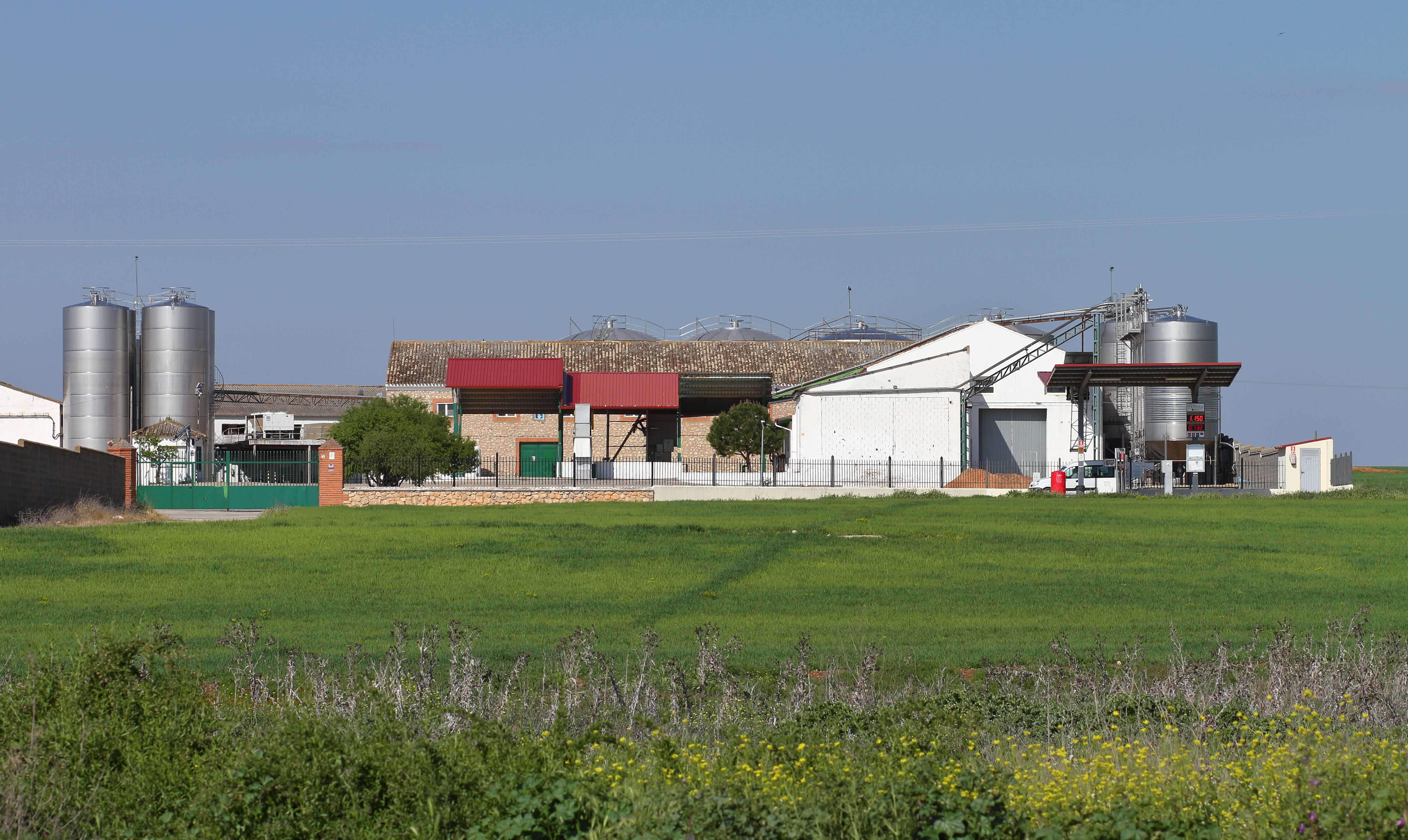 Horcajo de Santiago, Cooperativa agricola